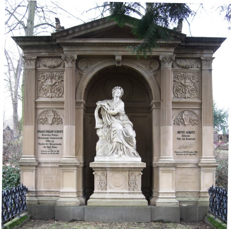 Grab des Musikverlegers und Bürgermeisters Franz Philipp Schott, 1811-1874, auf dem Hauptfriedhof Mainz